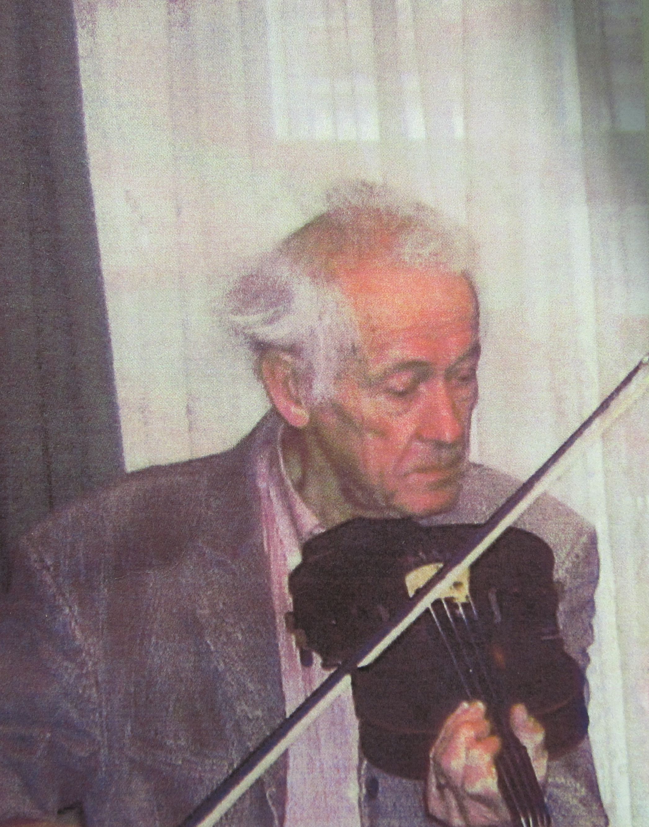 Porträt Rudolf Neuhauser